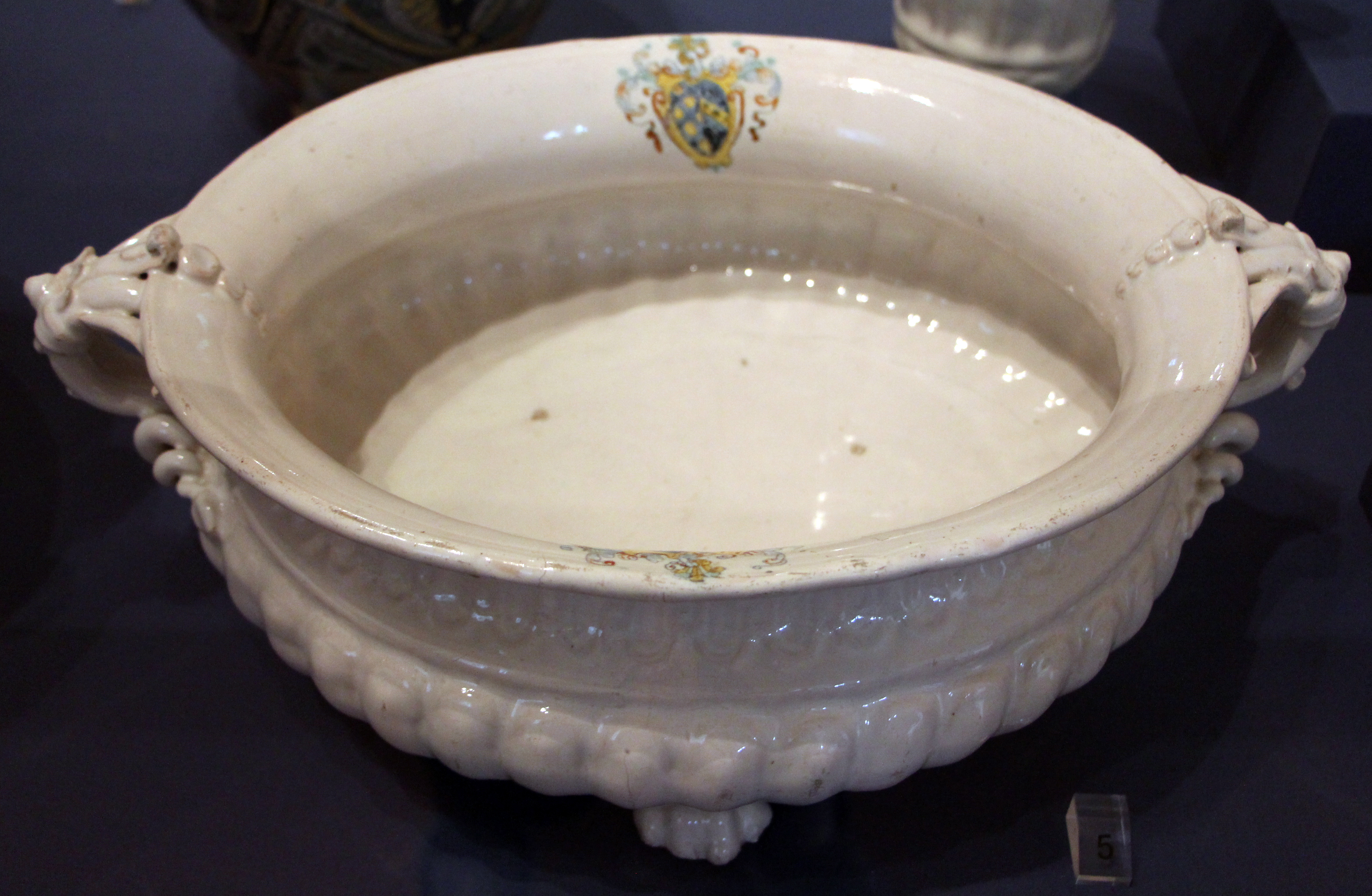 Villa medicea di Cerreto Guidi - MIBAC The making of this document was supported by Wikimedia CH. (Submit your project!) For all the files concerned, please see the category Supported by Wikimedia CH. This is a photo of a monument which is part of cultural heritage of Italy.